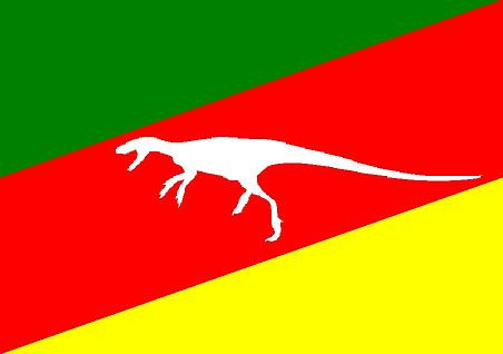 Bandeira do Geoparque Paleorrota